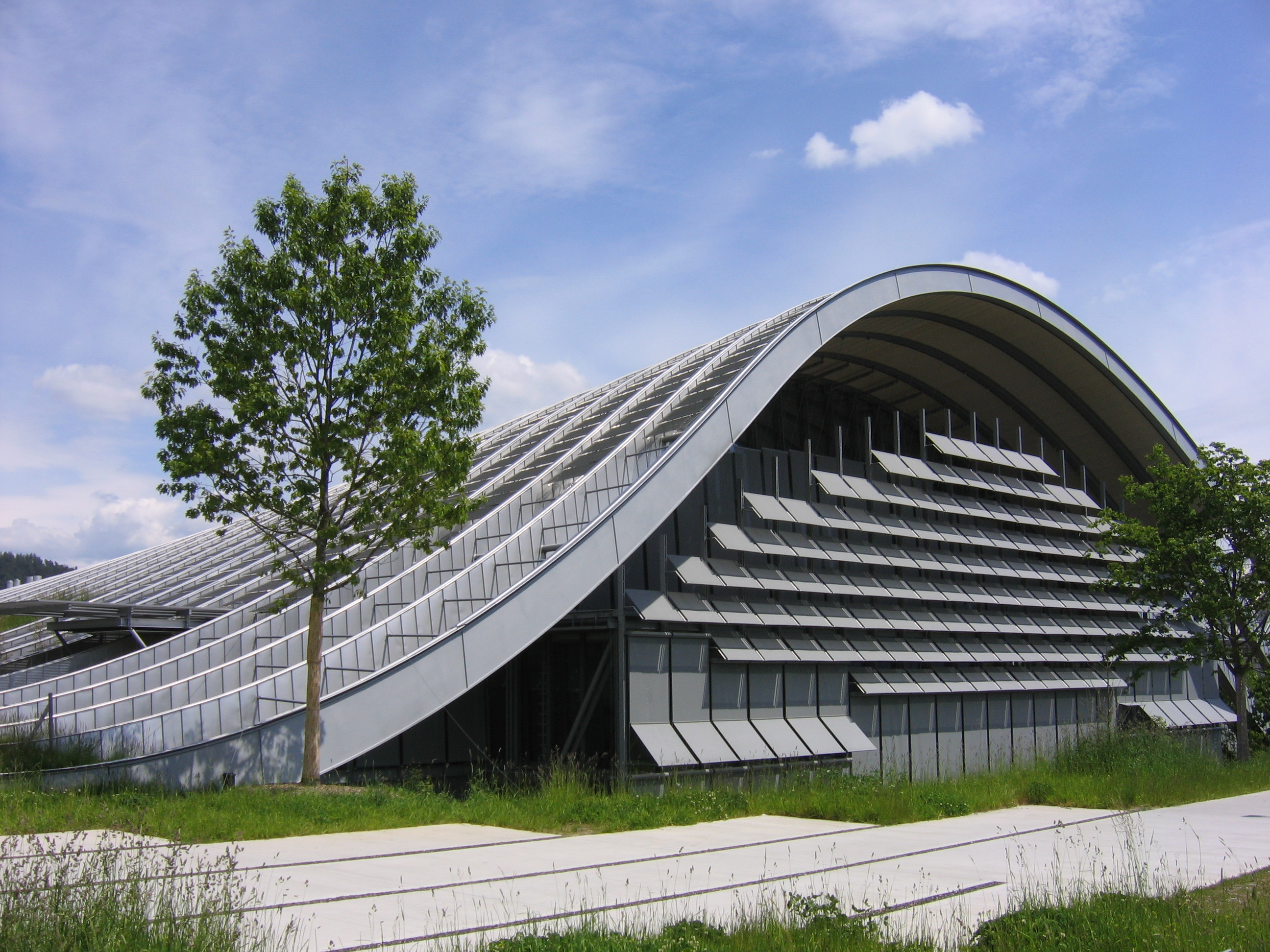 Zentrum Paul Klee, Bern. Architekt: Renzo Piano.